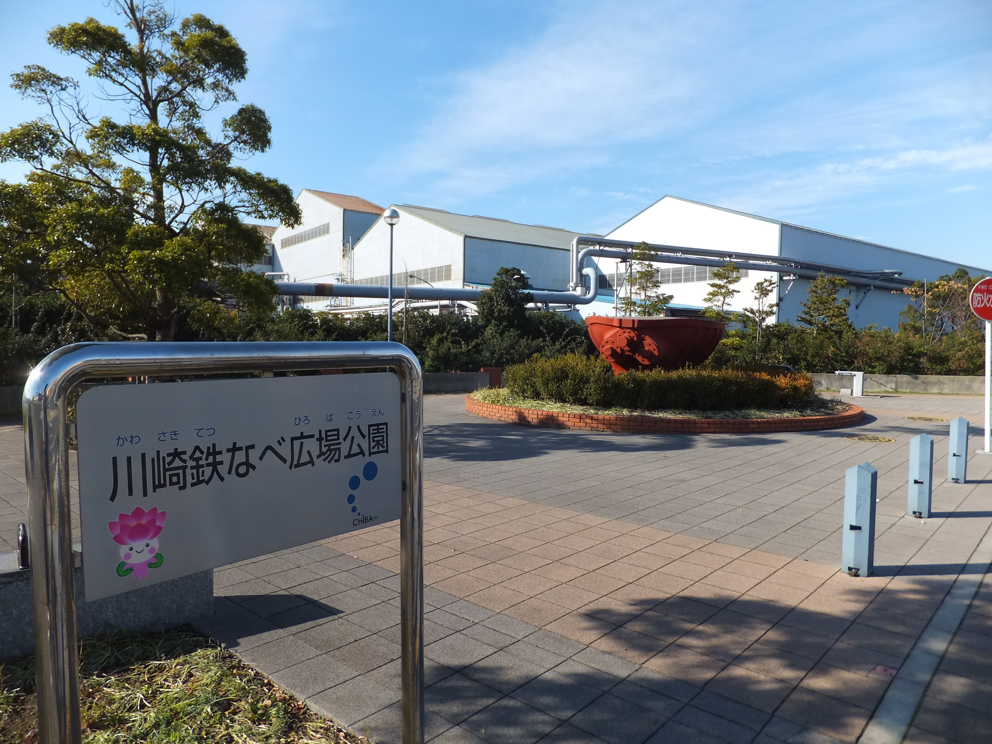 ハーバーシティ蘇我の一角にある川崎鉄なべ広場公園（千葉市中央区）。ハーバーシティ蘇我はJFEスチール東日本製鉄所（川崎製鉄千葉東工場）の敷地の一部を転用して整備された再開発地区で、かつて製鉄所で使われたスラグ鍋を設置した公園が整備された。